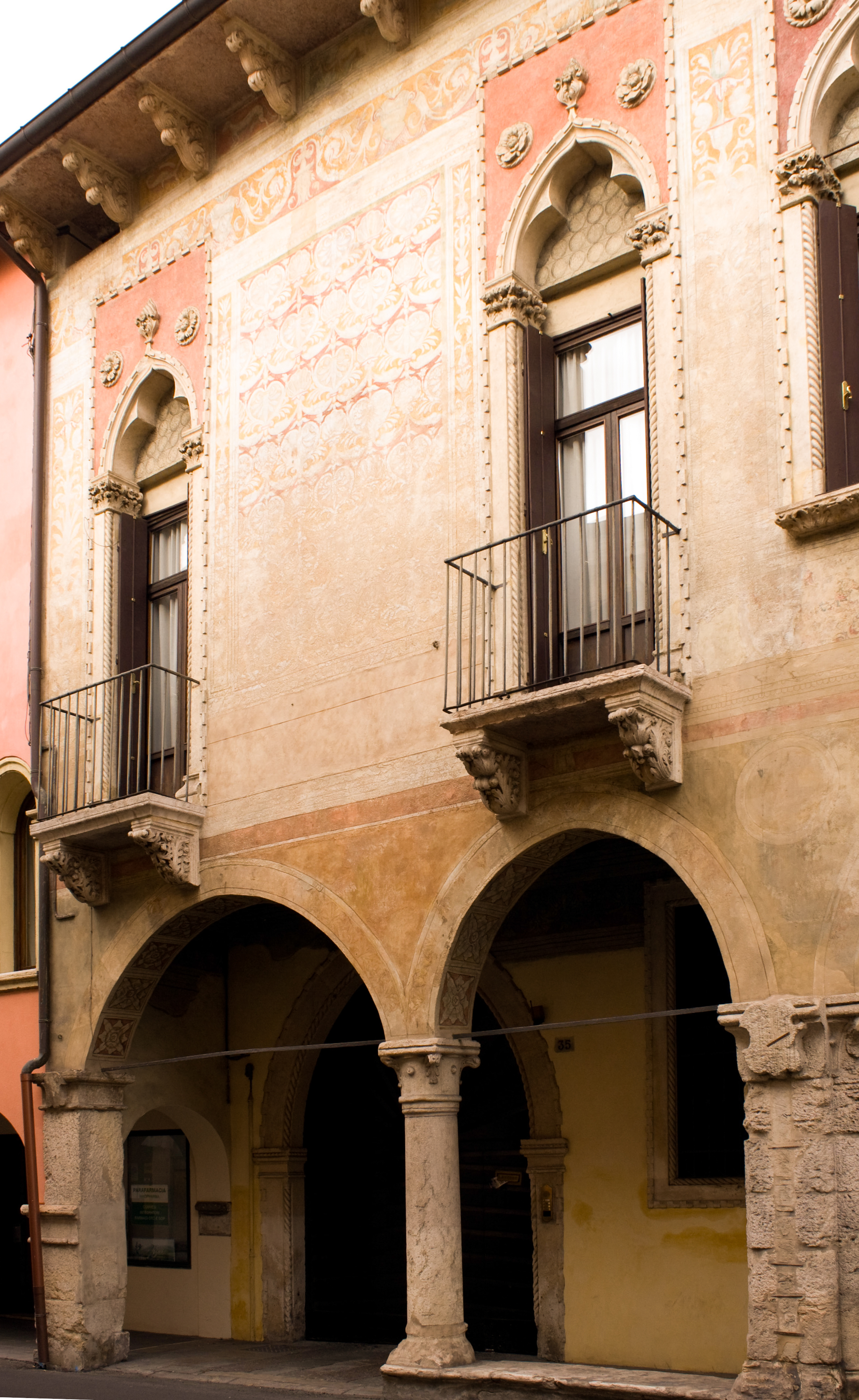 Palazzo Regaù - ala aggiunta successivamente